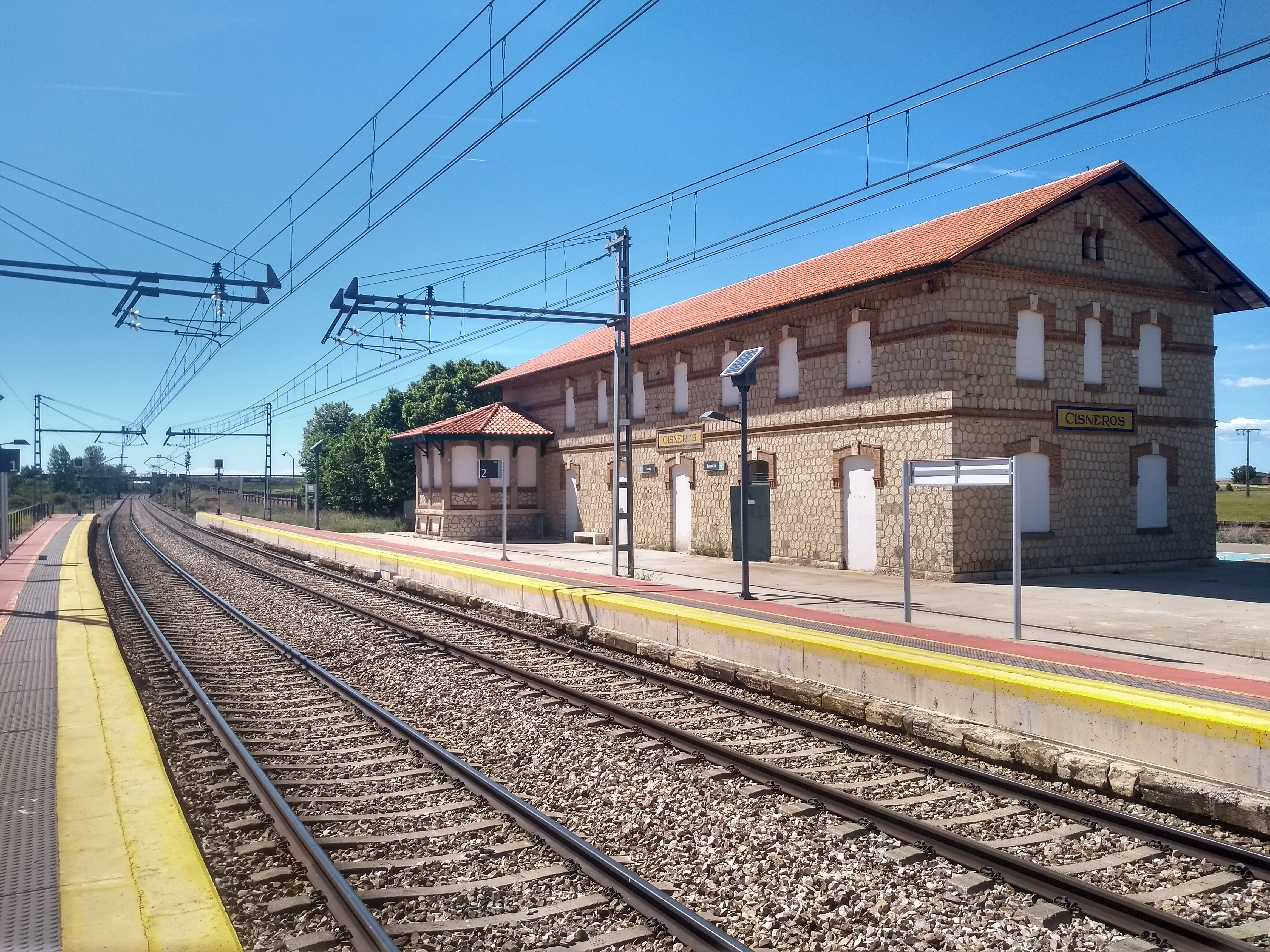 Estación de ferrocarril de Cisneros, provincia de Palencia, España.